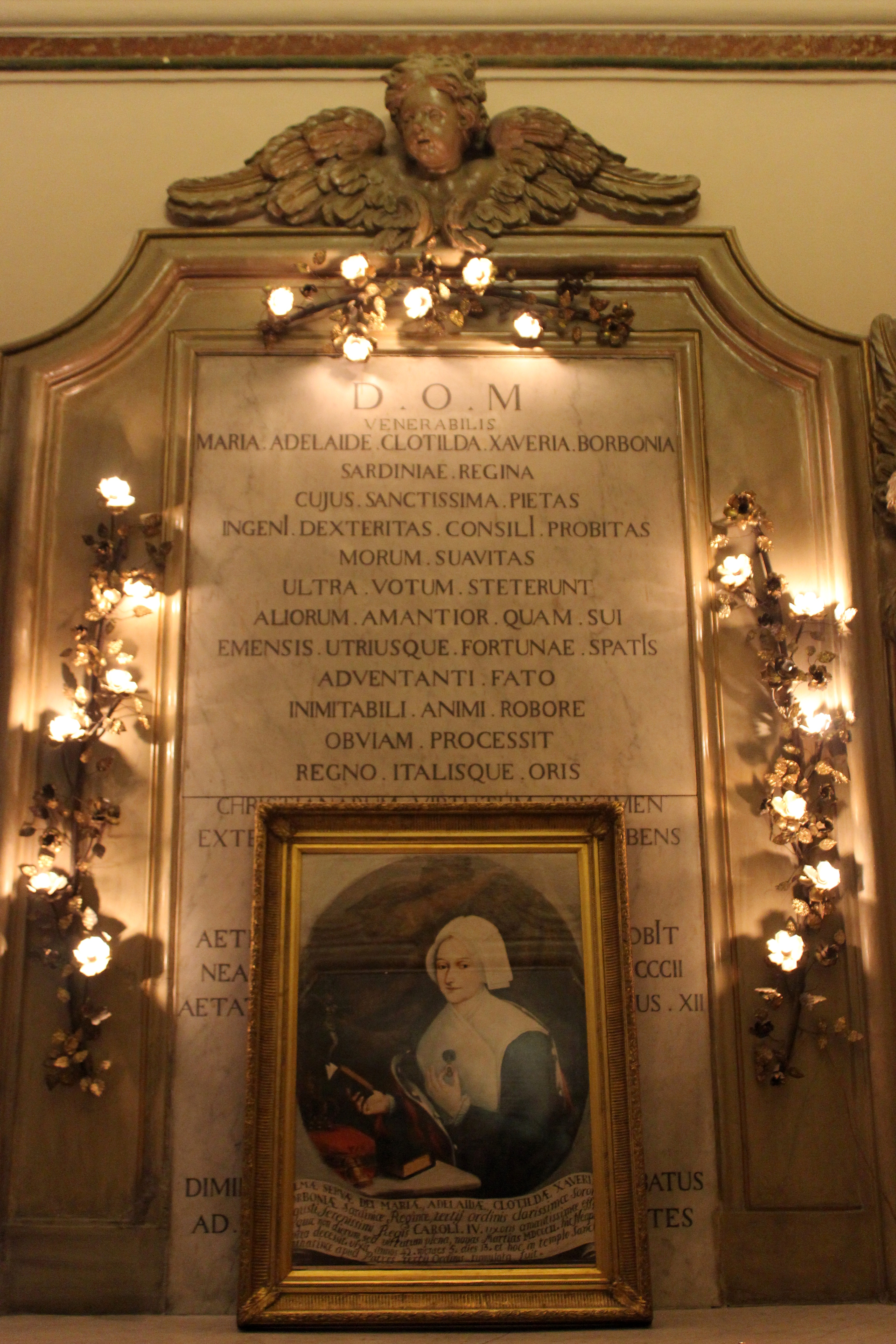 Santa Caterina a Chiaia. Tumba de María Clotilde de Francia.